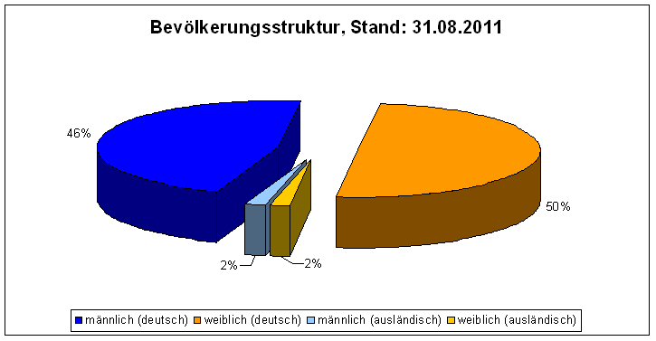 Bevölkerungsstruktur der Stadt Görlitz (Stand: 31.08.2011)